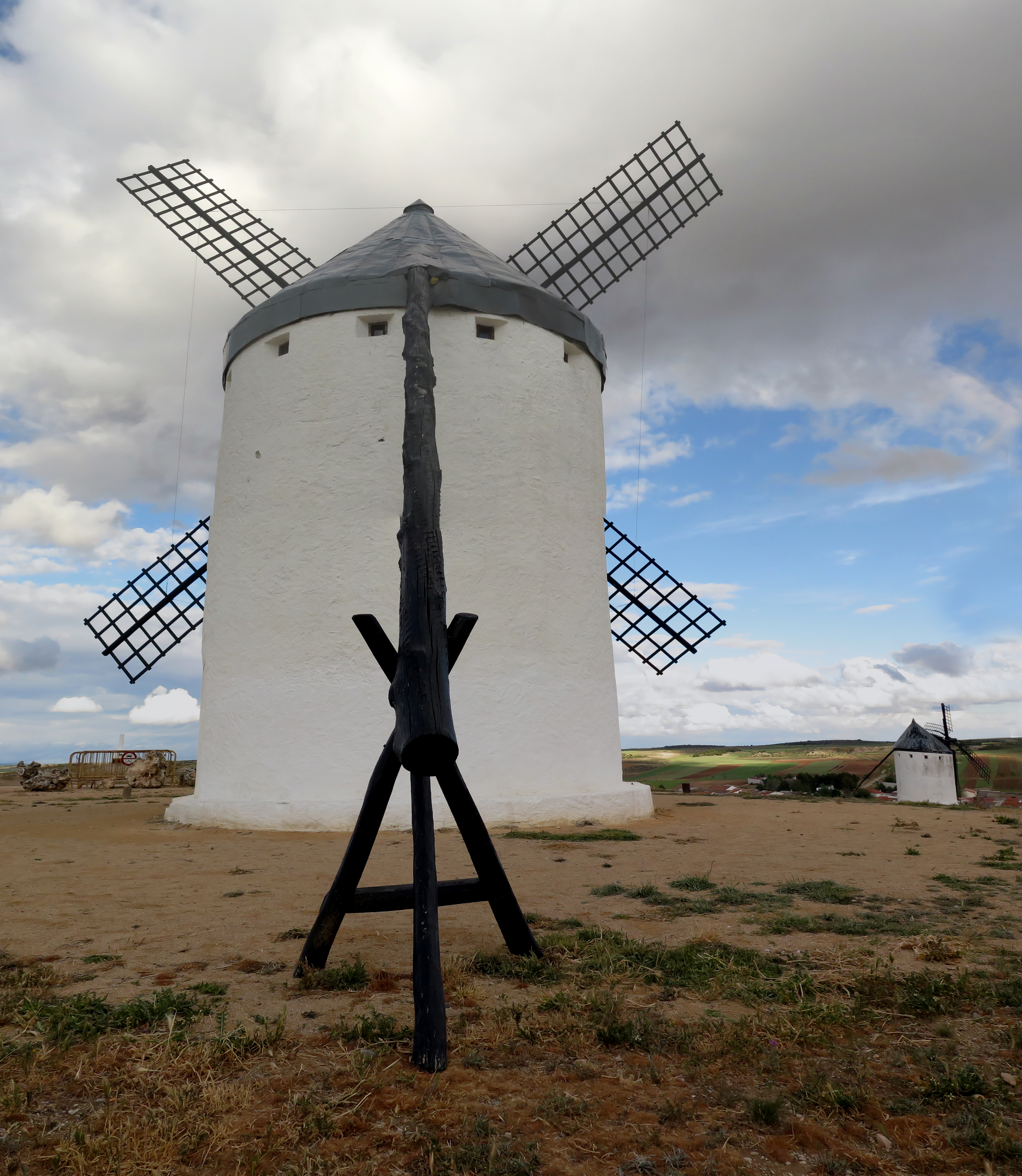 Molino Pechuga del pueblo El Romeral (provincia de Toledo), en Castilla-La Mancha (España).